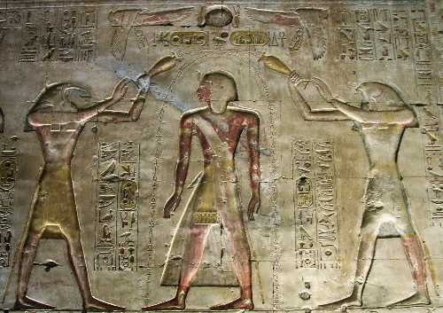 Deuxième exemple de relief en creux